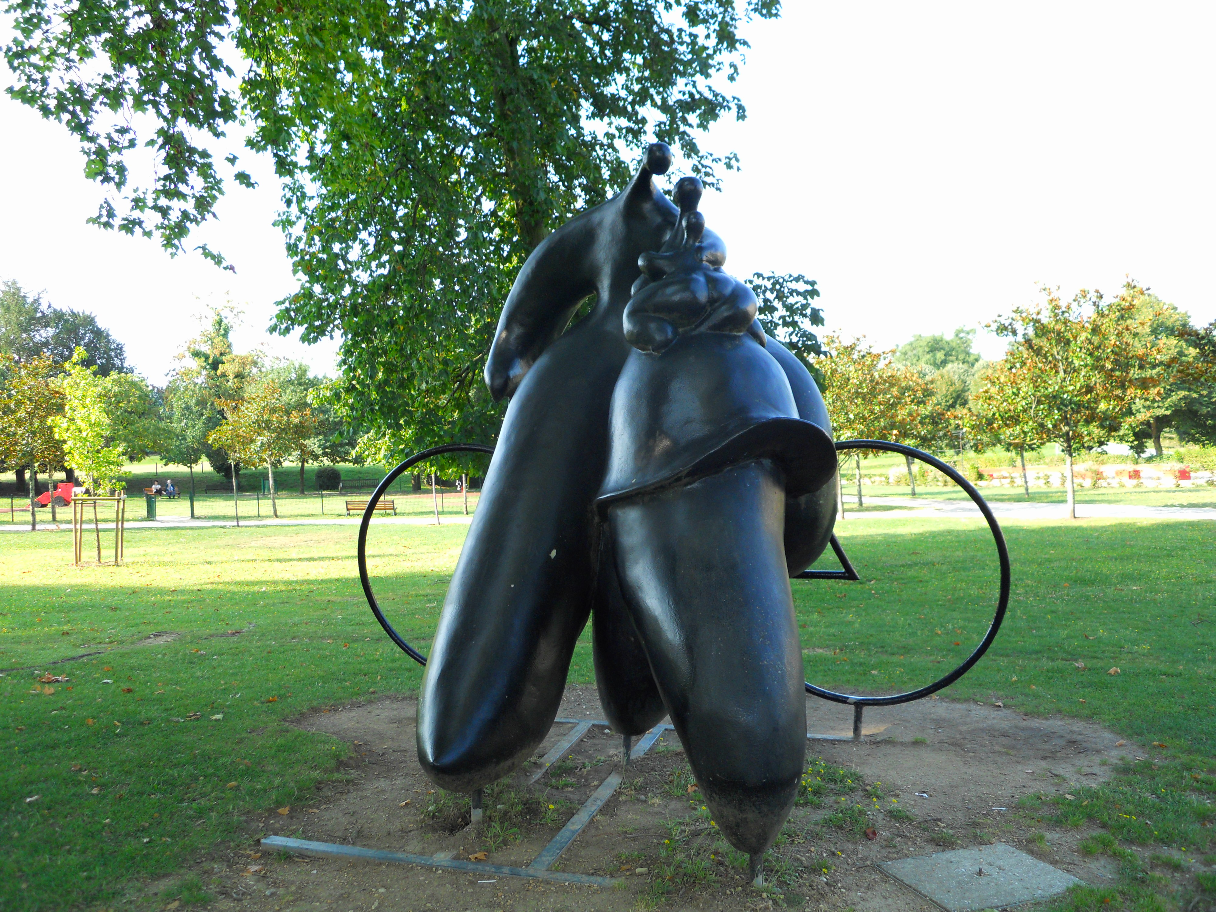 Scultura moderna nel parco pubblico di Cenon